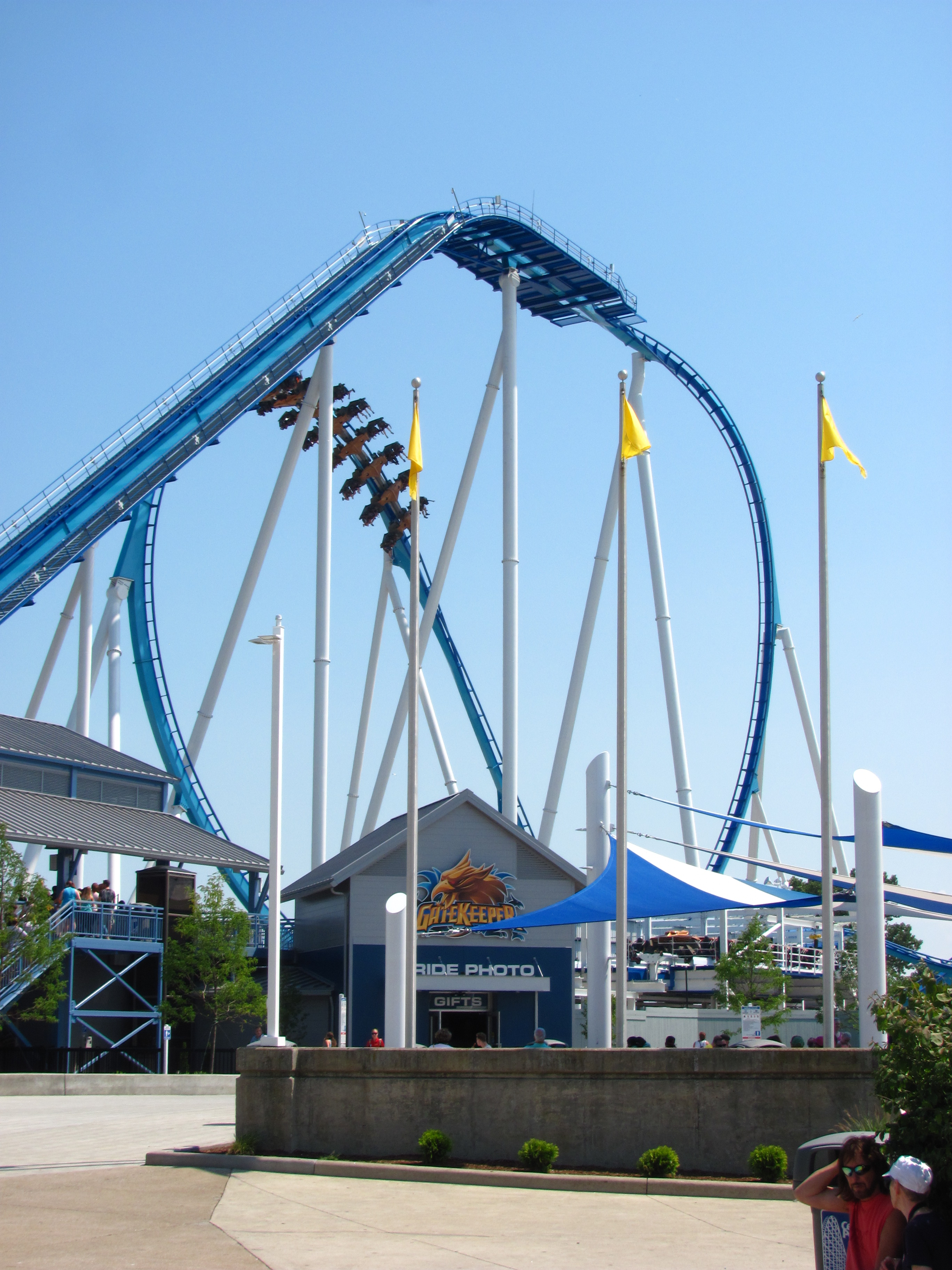 Cedar Point 088